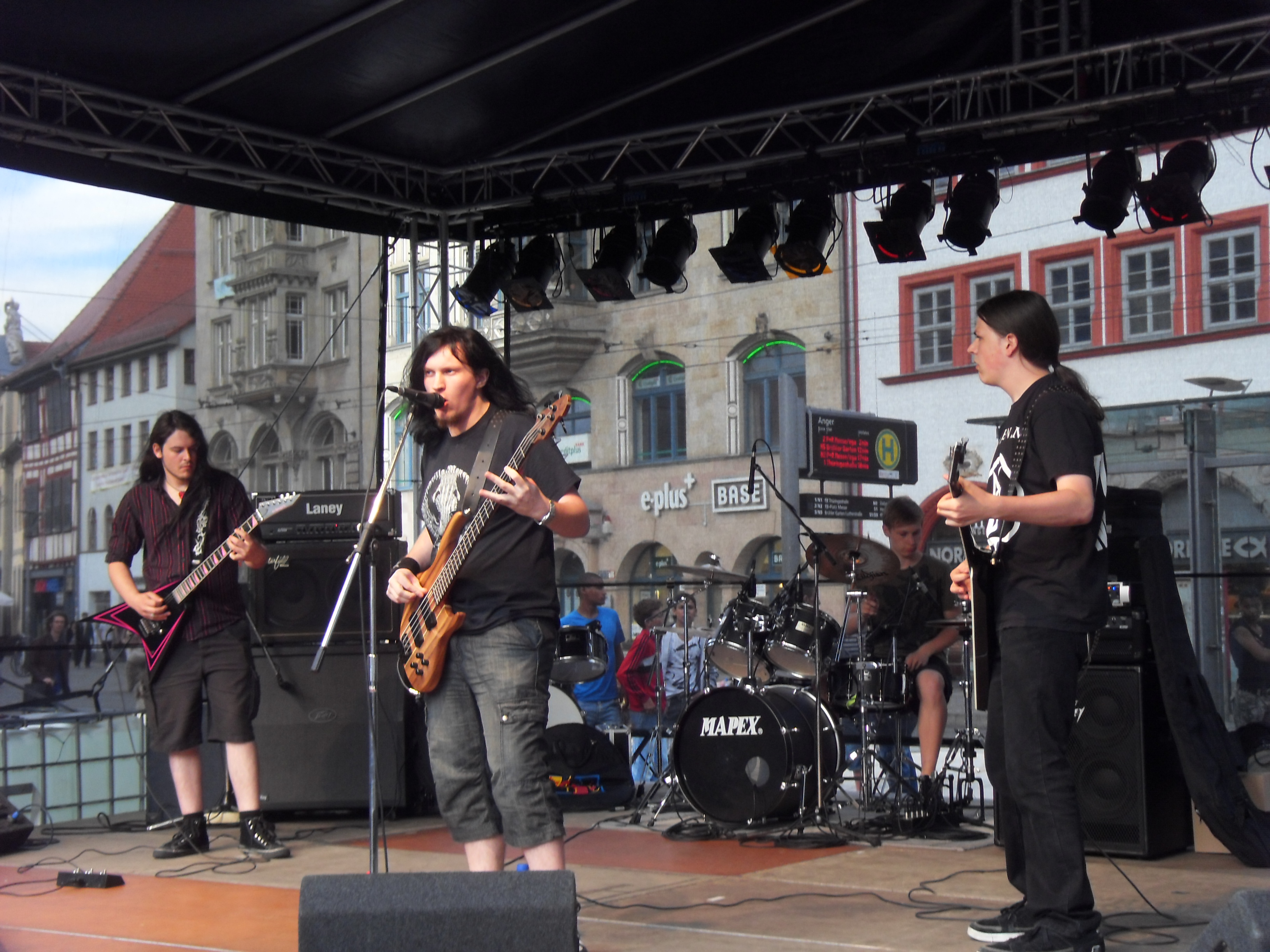 Live-Auftritt beim Krämerbrückenfest in Erfurt